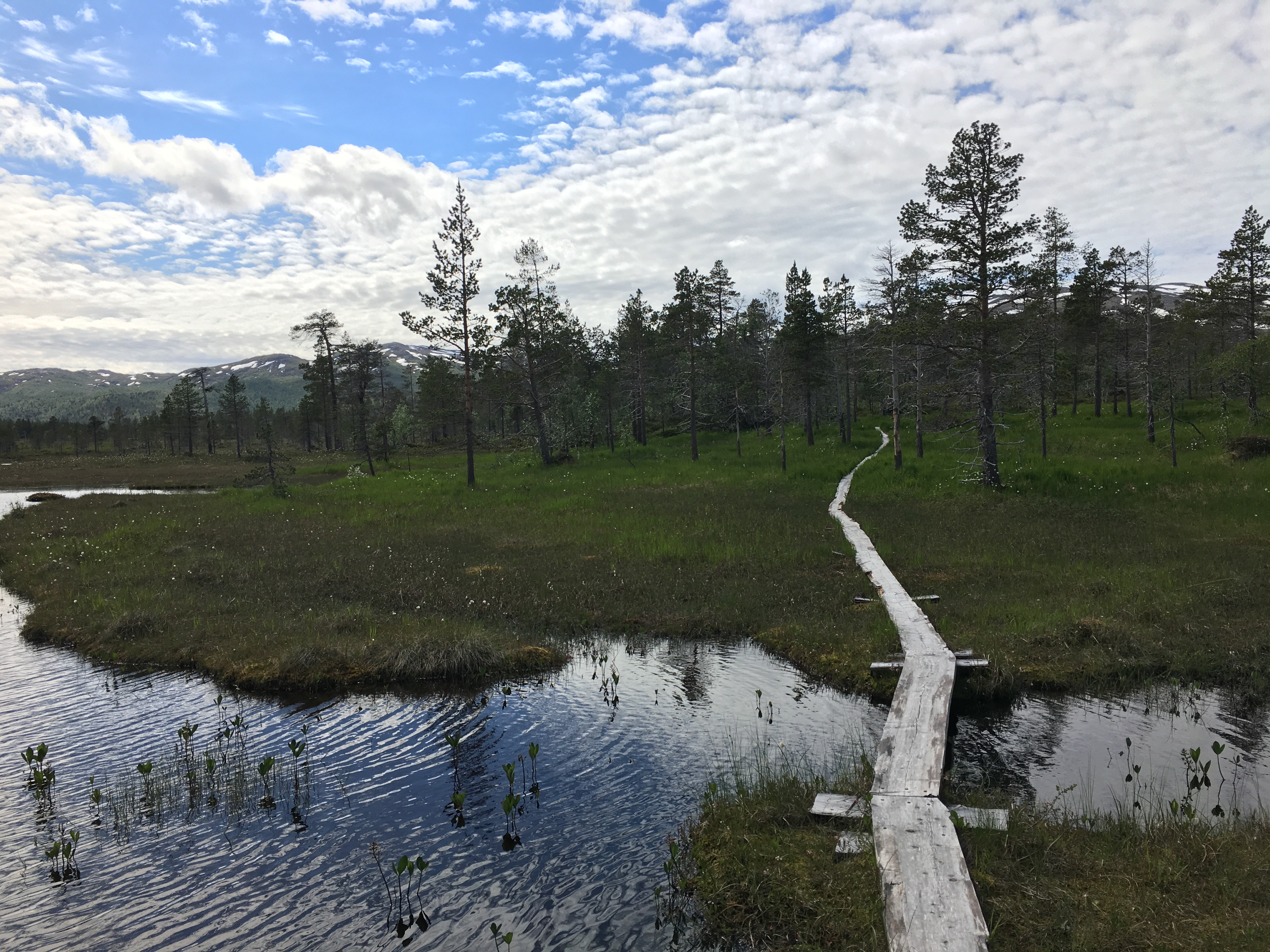 Myrområde i Ånderdalen nasjonalpark.